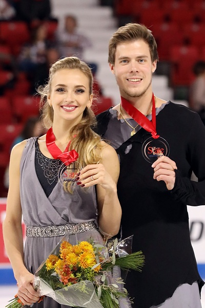 Виктория Синицина и Никита Кацалапов на этапе Гран-при Skate America 2017